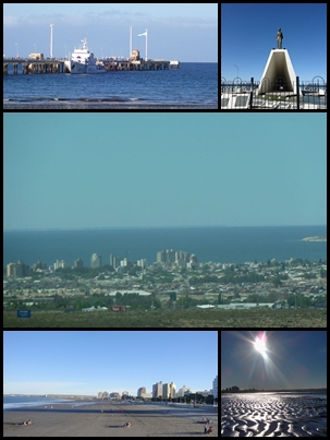 Montaje de Puerto Madryn, Patagonia Argentina